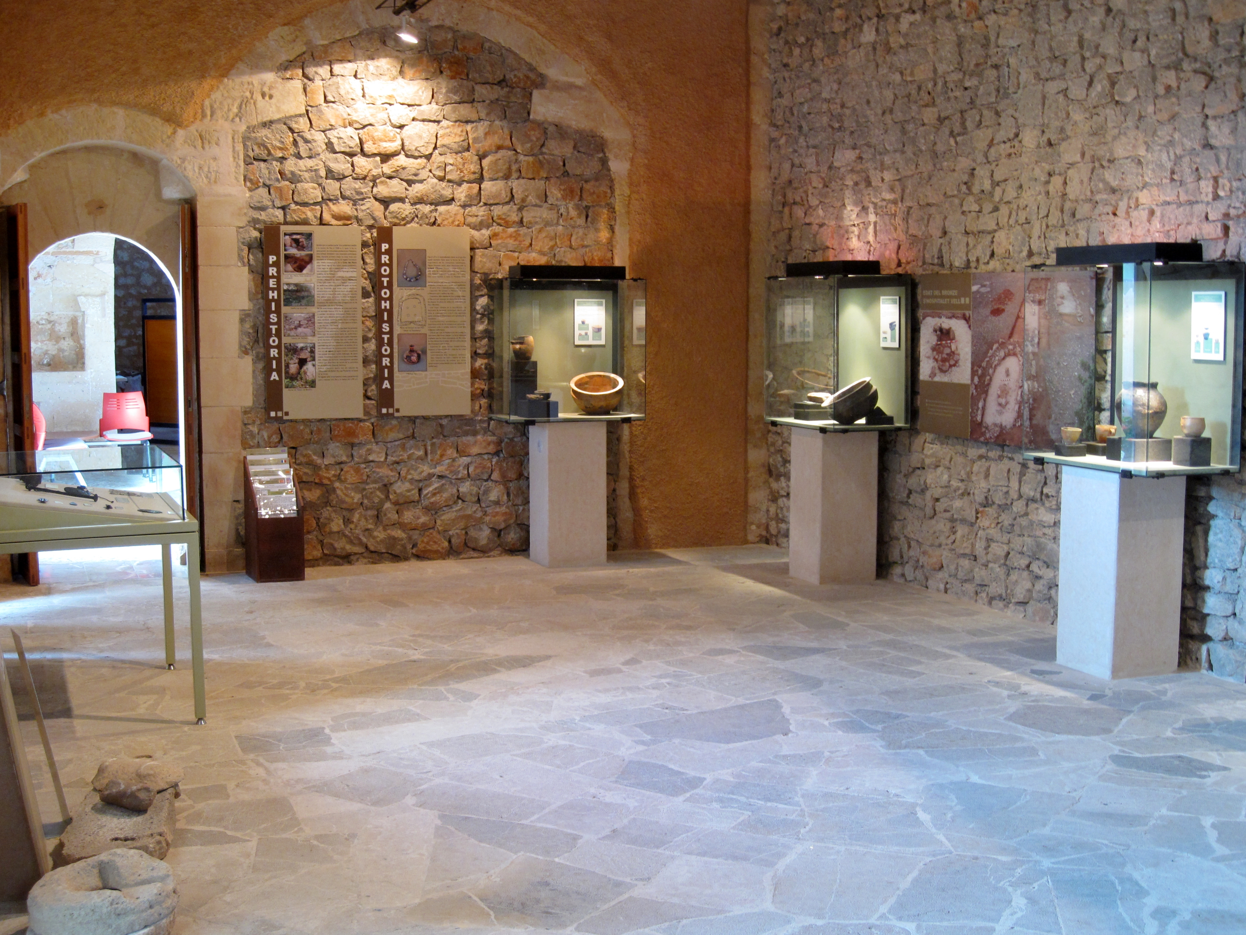 Der Prähistorische Saal im Historischen Museum von Manacor (Museu d’Història de Manacor), Gemeinde Manacor, Mallorca, Spanien